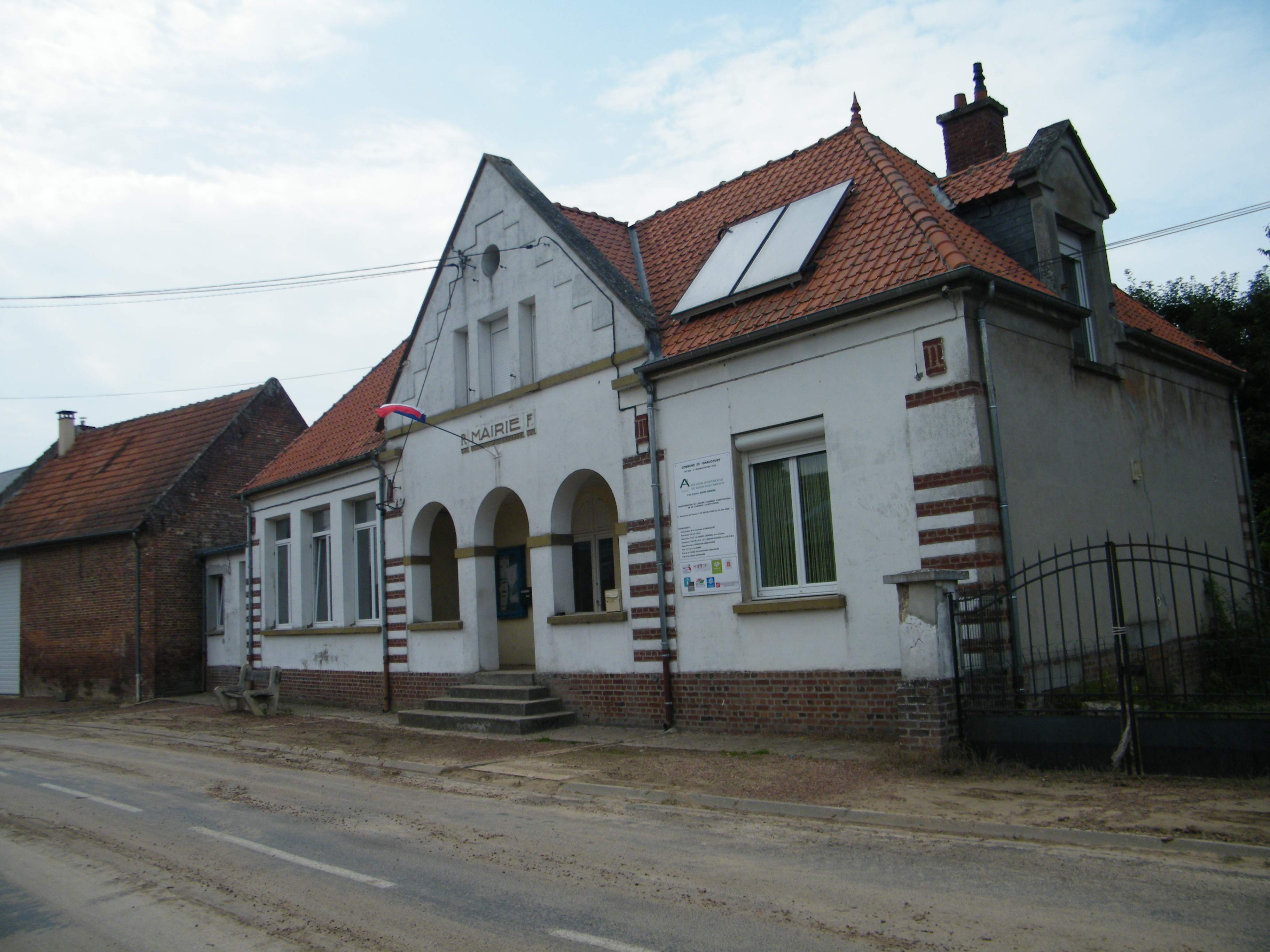 Mairie-école.